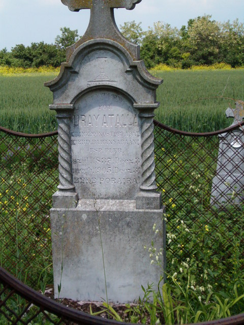 A kép Uray Atalla egykori baranyabáni plébános síremlékét ábrázolja. A sír a temetőkápolna észak-kelei sarkához közel, a kápolnához vezető út északi oldalán található.